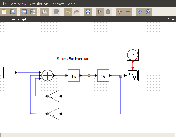 Representación de un sistema realimentado mediante XCOS